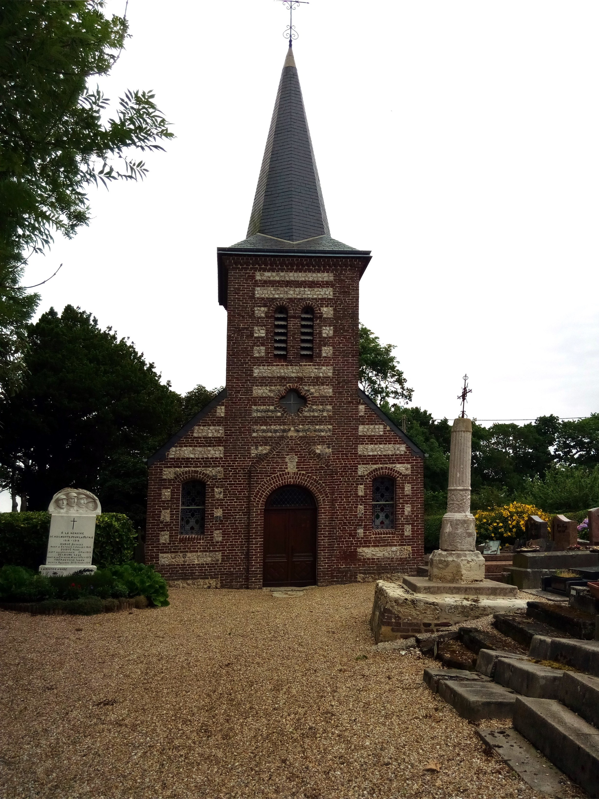 Église Saint-Jean-Baptiste, Pierrefiques, Seine-Maritime, France.